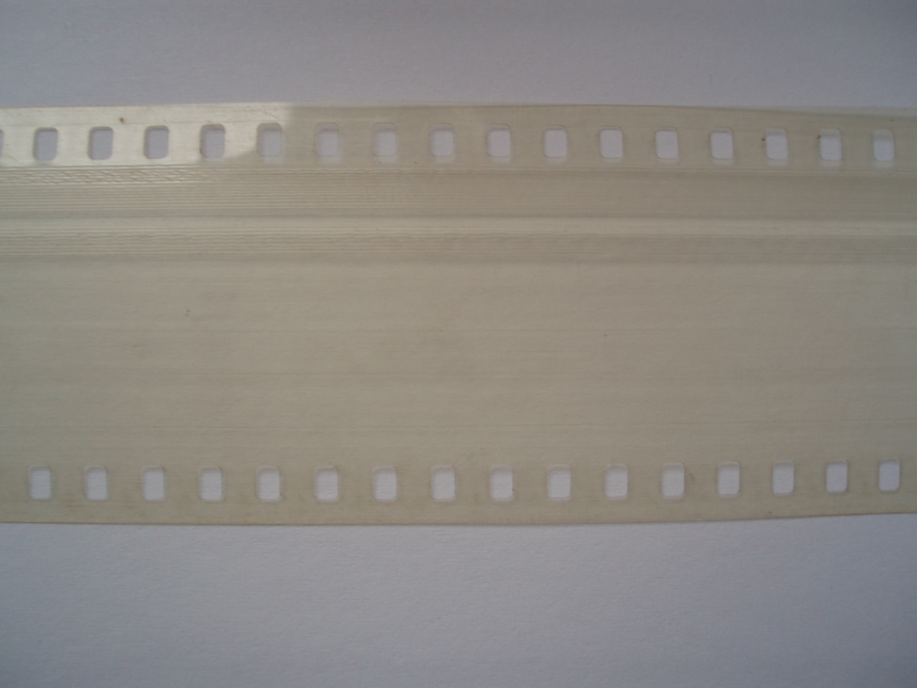 A Longaphon készülékhez használatos 35 mm-es filmszalag, mely normál barázdás hangfelvételt tartalmaz